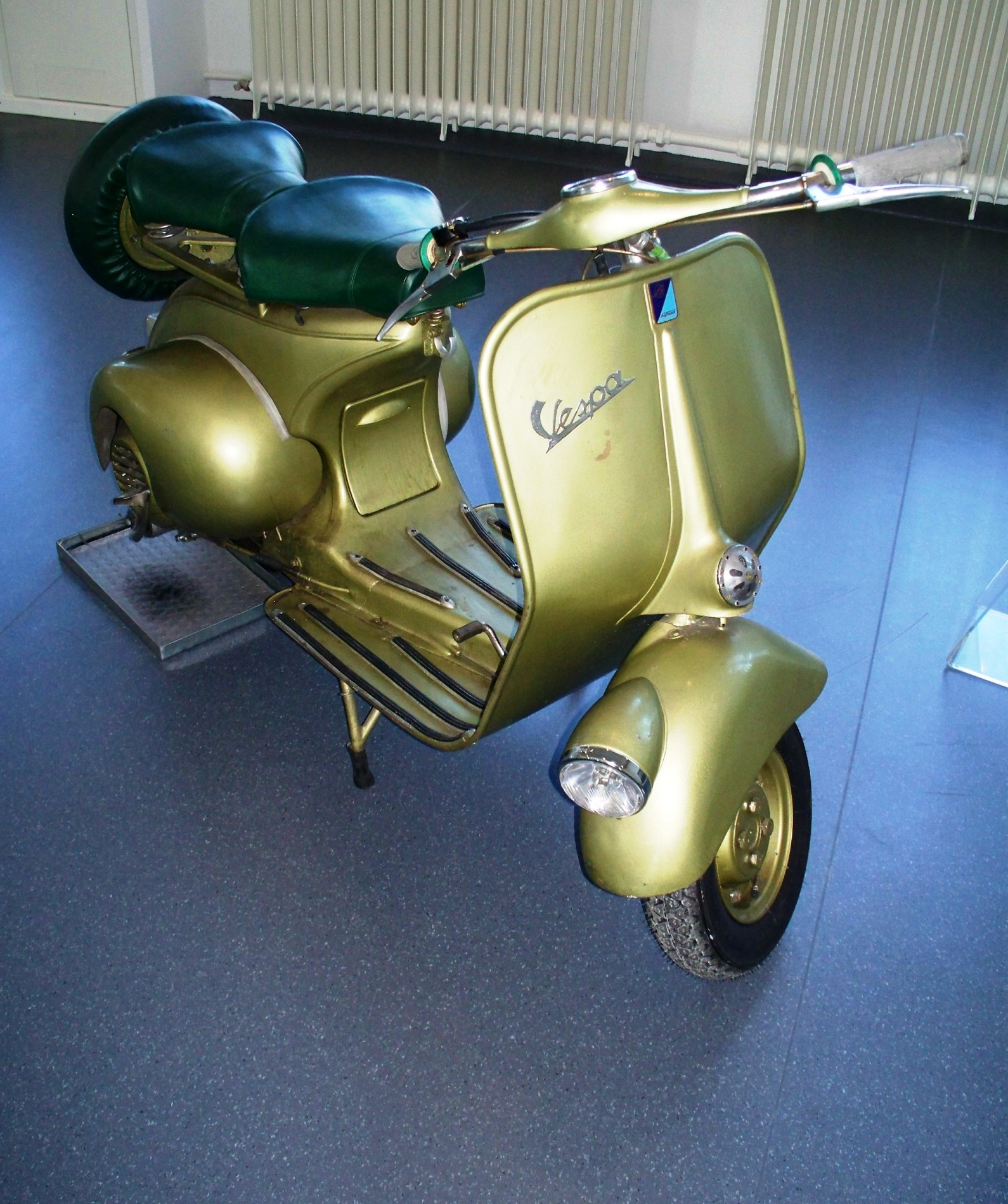 Vespa 125 Hoffmann in der Sonderausstellung Geliebte Technik der 1950er Jahre im Deutschen Museum.